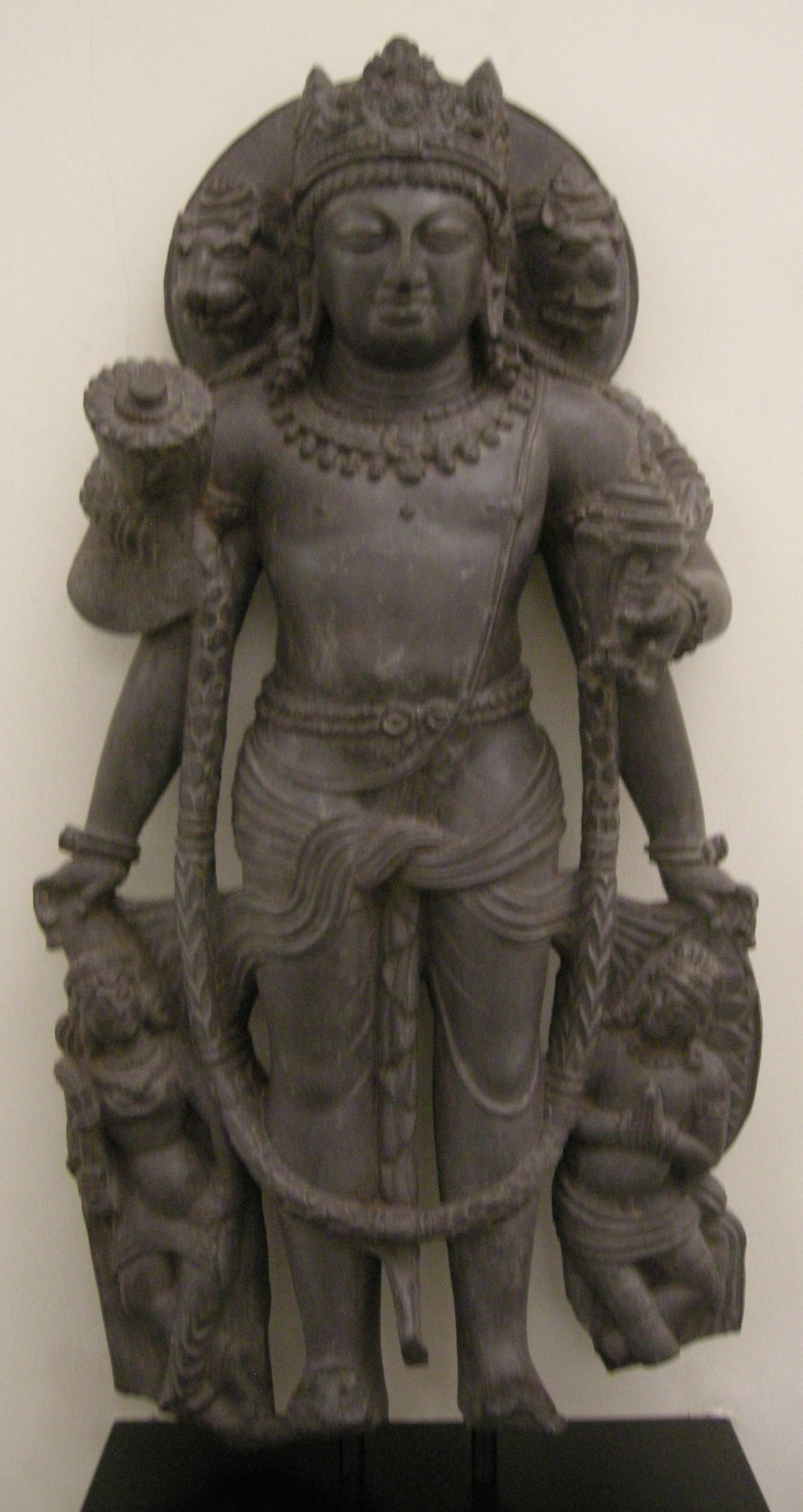 Kashmir, vaikuntha vishnu, VII sec